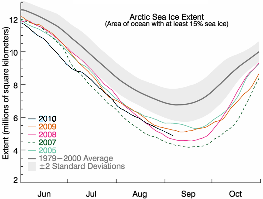 Surface de la banquise en million de kilomètres carrés avec au moins 15 % de mer glacé. Chaque année la banquise a une surface inférieure à la moyenne 1979 — 2000.